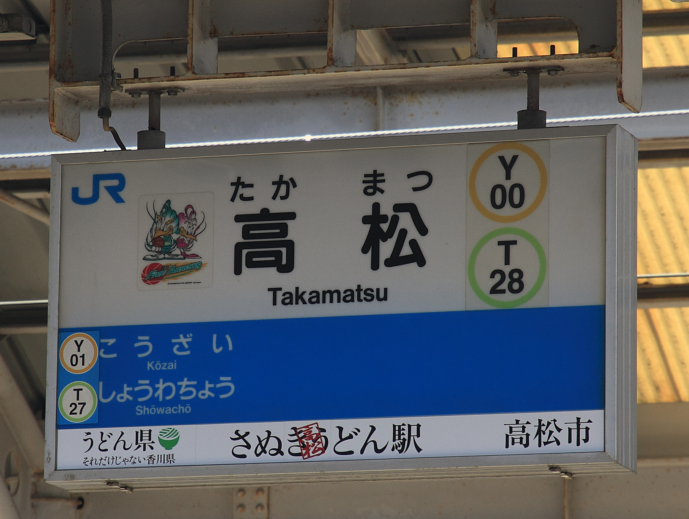 高松駅 駅名標 さぬき高松うどん駅